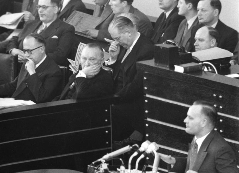 2. Lesung der Pariser Verträge im Deutschen Bundestag am 25. Februar 1955 Dr. Mommer (SPD) spricht